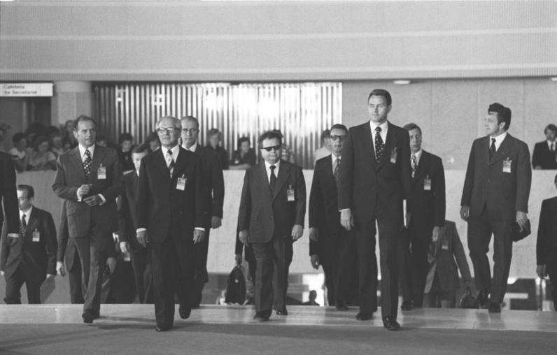 Helsinki, KSZE-Konferenz, DDR-Delegation ADN-ZB Sturm / 30.7.75 / Helsinki / Sicherheitskonferenz - vor der Eröffnung Die dritte und abschließende Phase der Konferenz über Sicherheit und Zusammenarbeit in Europa ist am Mittwochnachmittag in der Finlandia-Halle in Helsinki eröffnet worden. Die Delegation der DDR (hier bei ihrem Eintreffen an der Konferenzstätte) wird vom Ersten Sekretär des ZK der SED, Erich Honecker (2.v.l.) geleitet. (UBz: weiter die Mitglieder der Delegation H. Axen 3.v.l. und O. Fischer 1.v.l.) [Finnland, Helsinki.- KSZE-Konferenz.- DDR-Delegation, vlnr: Oskar Fischer, Erich Honecker, Hermann Axen,] Abgebildete Personen: Axen, Hermann: Politbüro des ZK der SED, Volkskammerabgeordneter, Friedensrat, DDR (GND 119328569) Fischer, Oskar: Minister für Auswärtige Angelegenheiten, SED, DDR Honecker, Erich: Staatsratsvorsitzender, Generalsekretär des ZK der SED, DDR (GND 118553399)